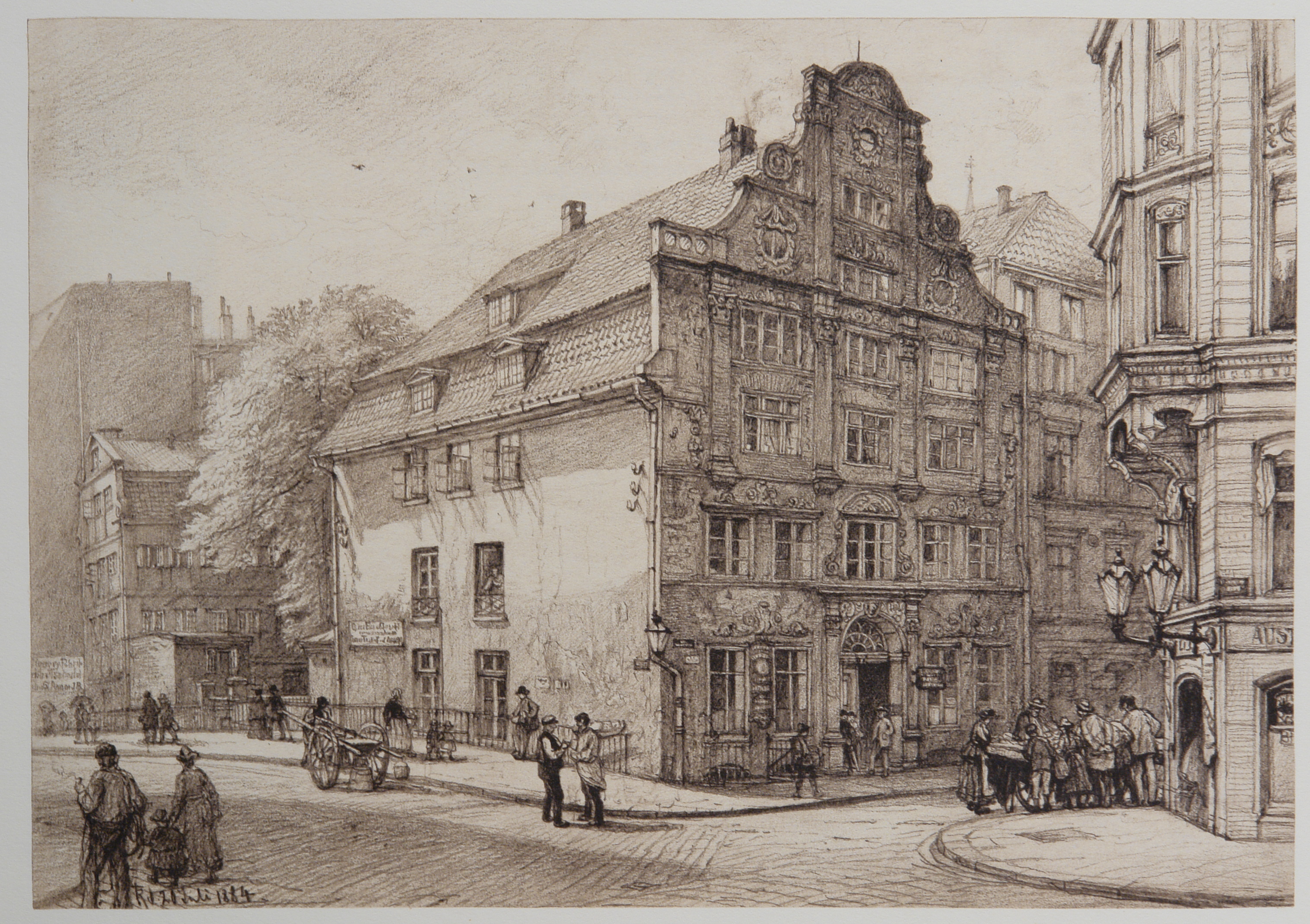 HAMBURG. Augenblicke einer Stadt 1882-1894. In 50 Zeichnungen von Johann Theobald Riefesell nach Originalen im Museum für Hamburgische Geschichte. Alte-Gröningerstraße-20 20-07-1884